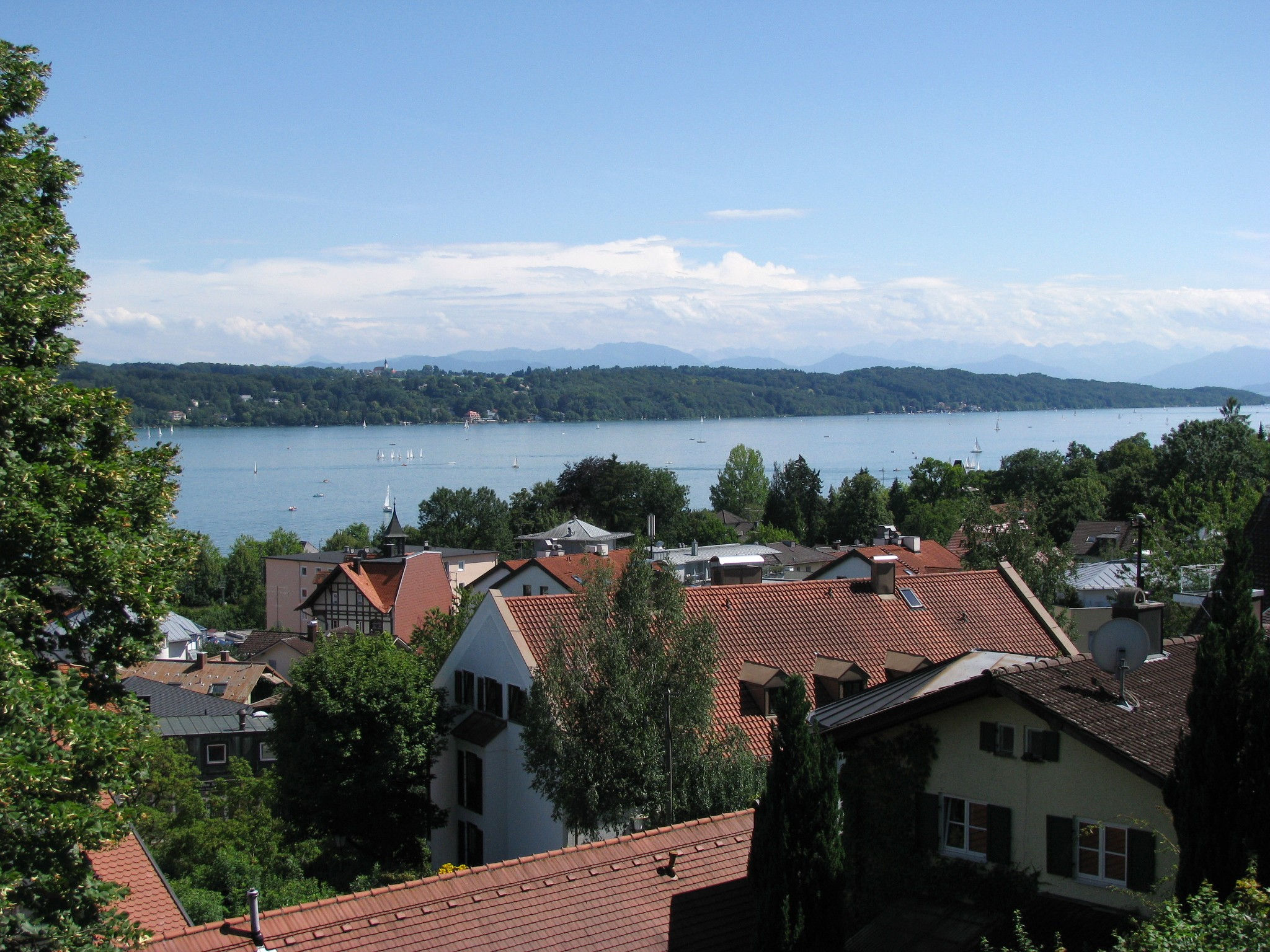 Blick auf Starnberg und den Starnberger See vom Schlossgarten